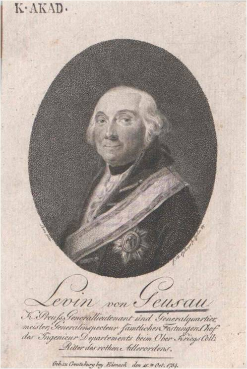 Porträt von Levin von Geusau (erstellt 1734)